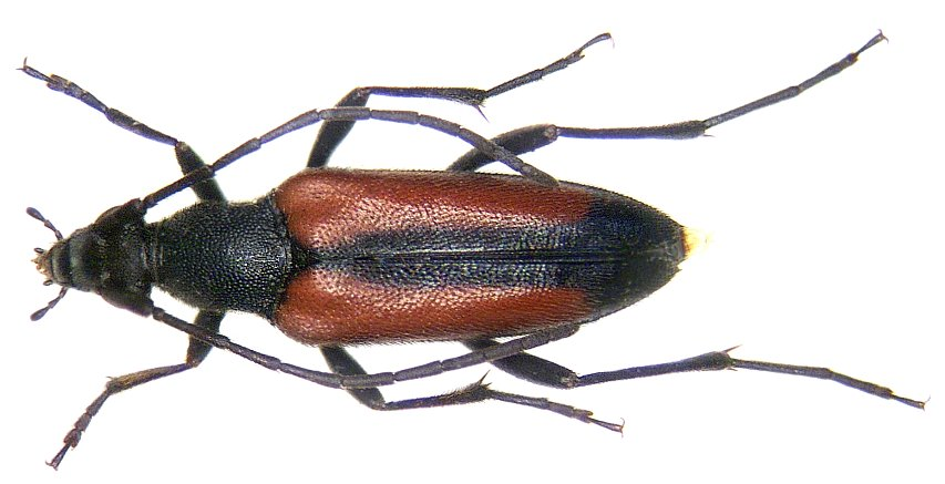 Familie: Cerambycidae Grösse: 6-10 mm Verbreitung: Europa Ökologie: Entwicklung in Laub- und Nadelholz Fundort: Germania, Bayern, Oberfranken, Selbitz leg.det. U.Schmidt, 1972 Foto: U.Schmidt, 2005